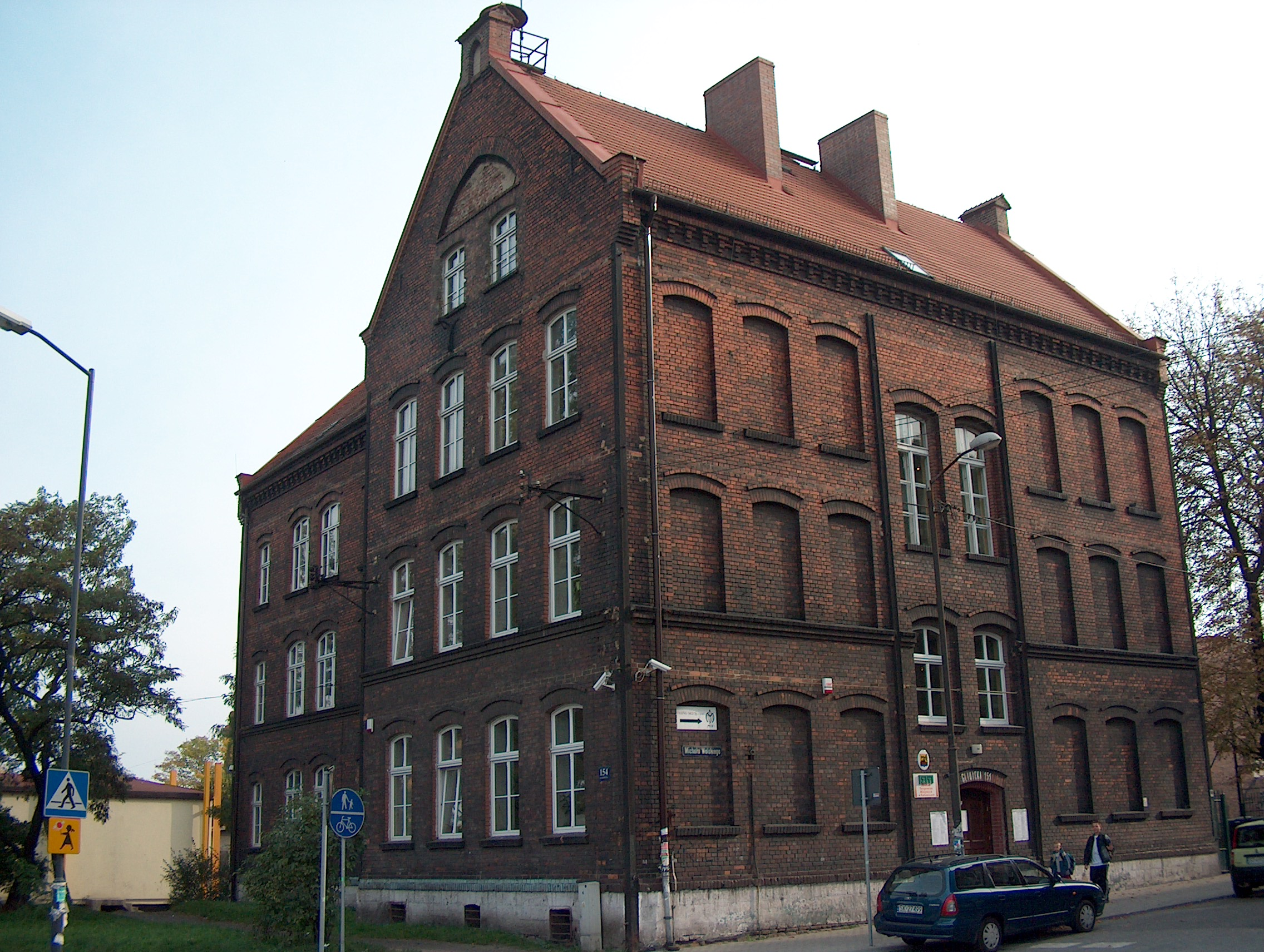 Ulice Wolskiego v Katowicích-Załęże, Polsko